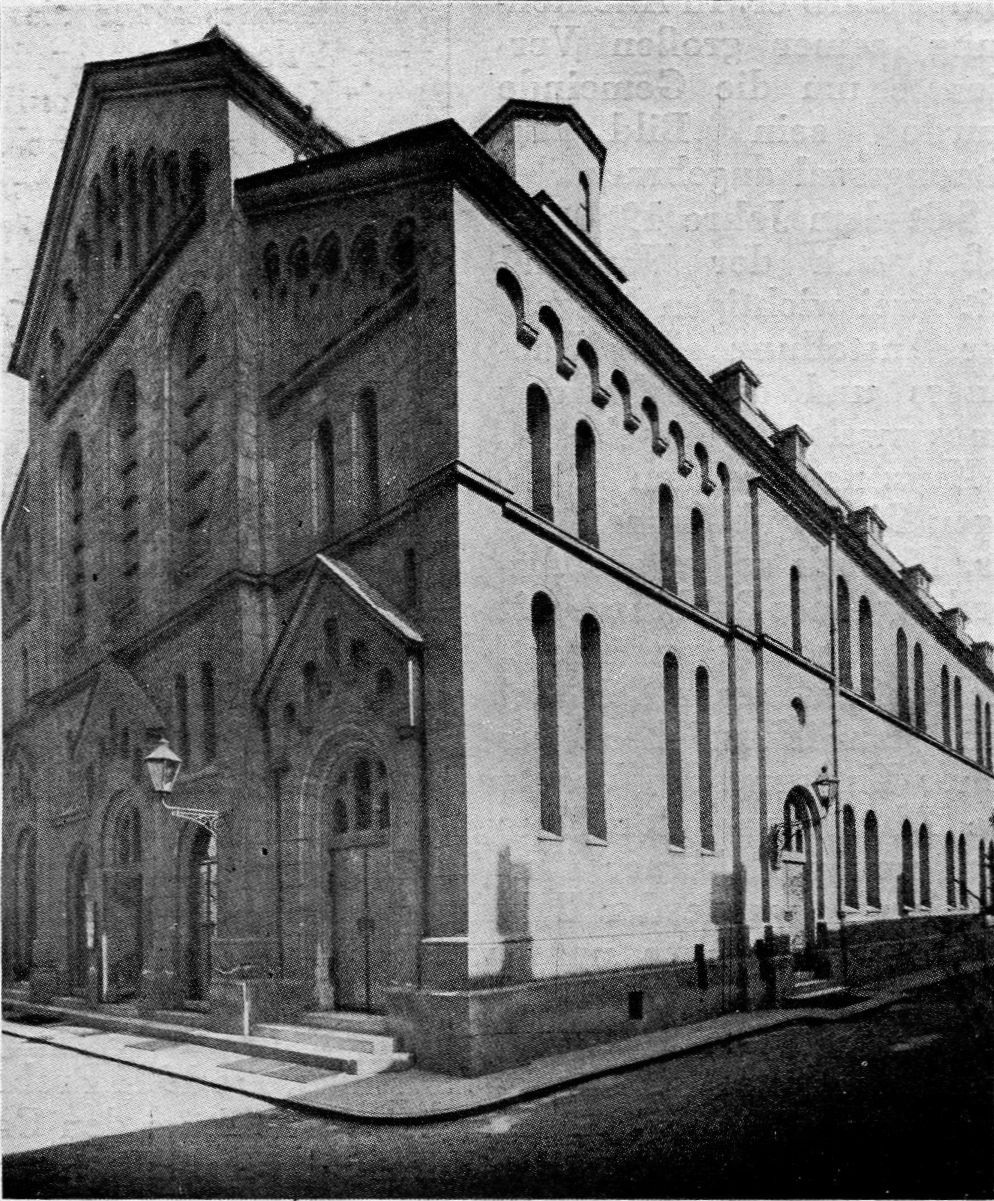 Exteriér Nové synagogy v Brně